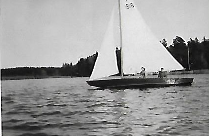 Star luokan vene Vesta 1940